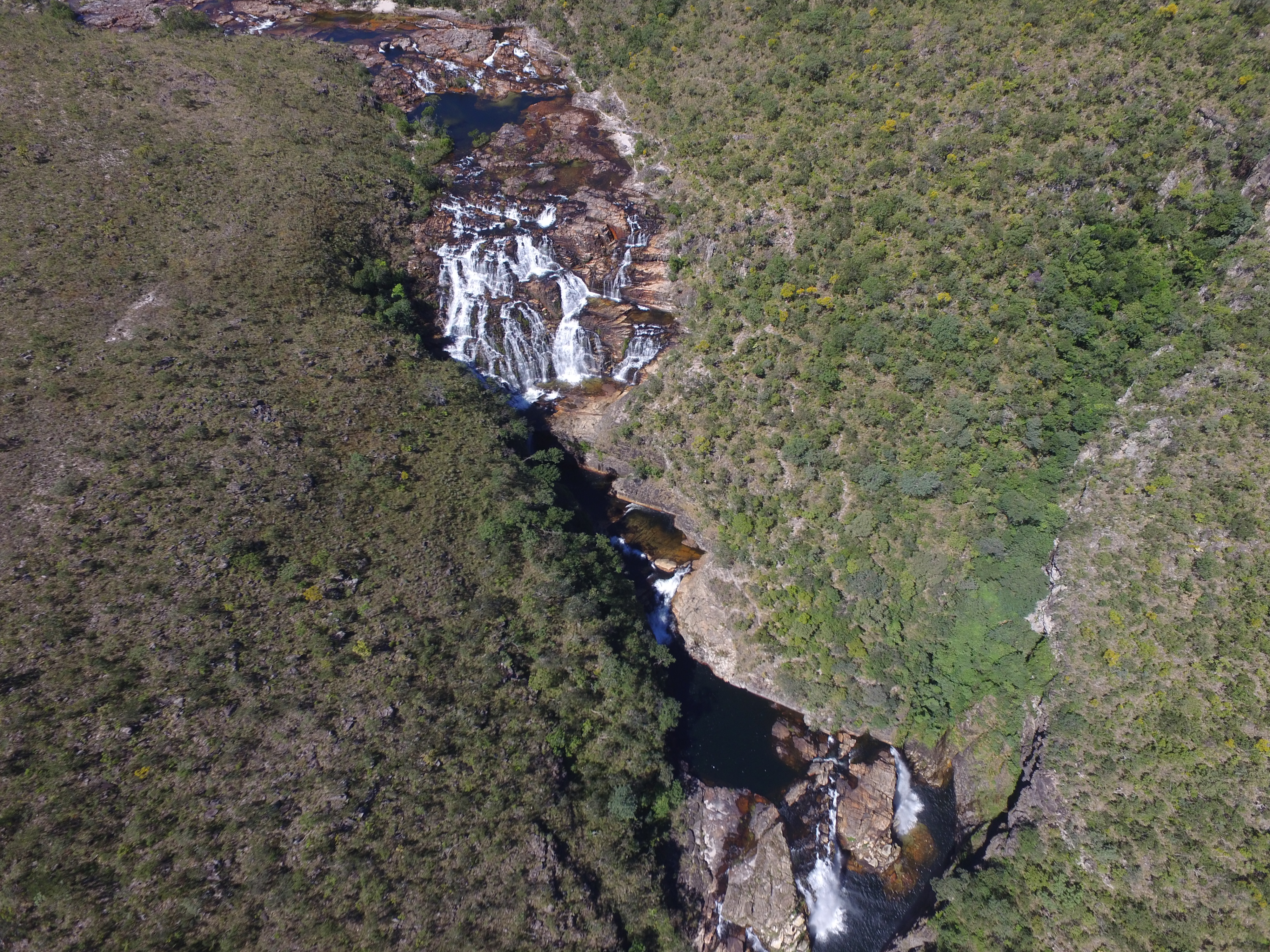 Cachoeira no Rio dos Couros, em área aberta ao público